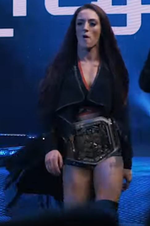 Kay Lee Ray avec la ceinture de championne du Royaume Uni de NXT UK.